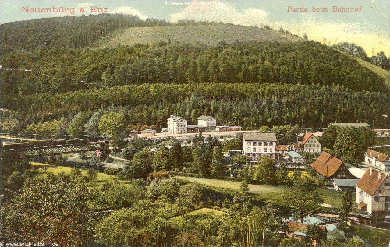 Bf. Neuenbürg